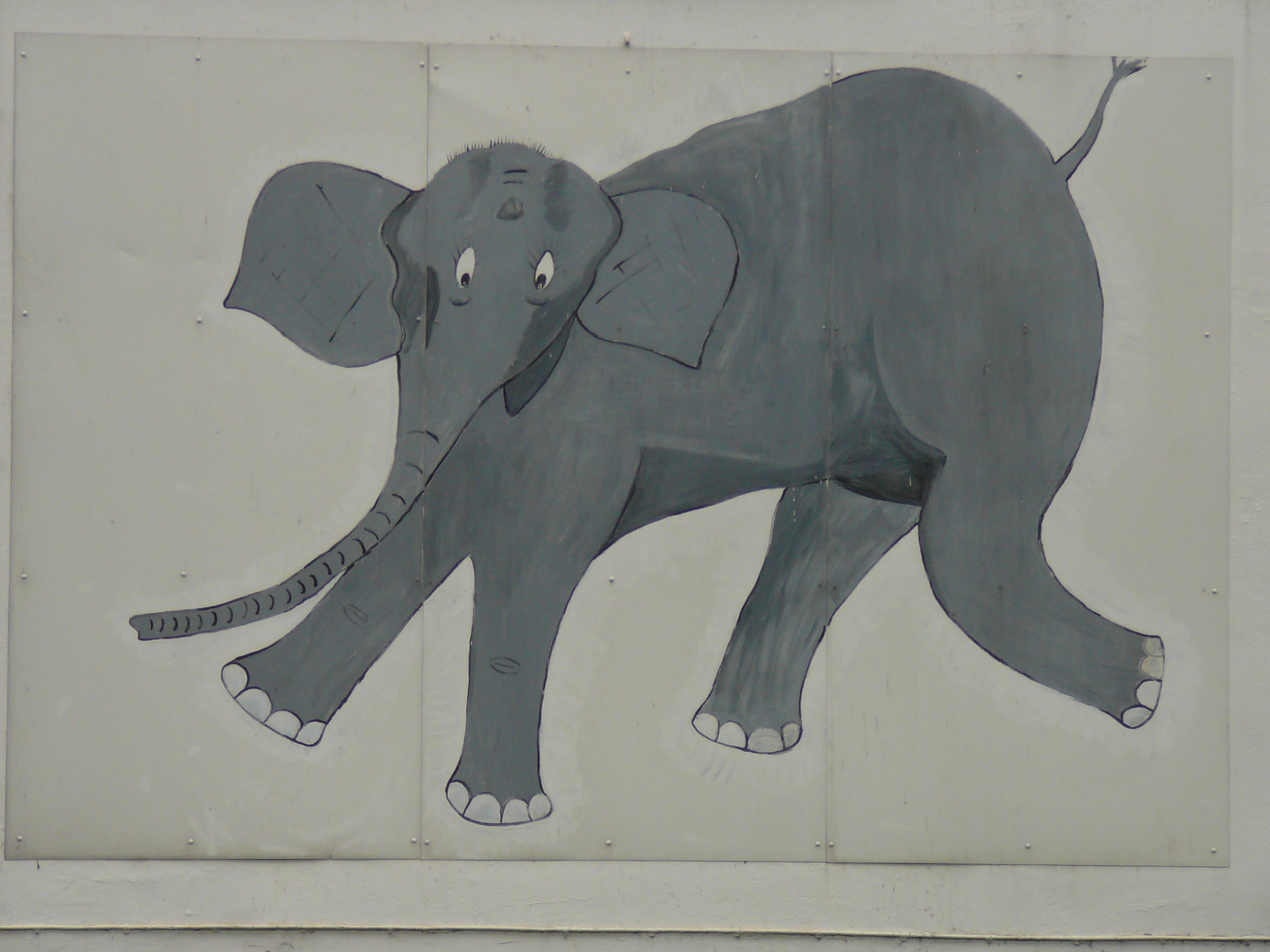 Gemälde von Erika Nagel, 1998, Friedrich-Engels-Allee, Wuppertal